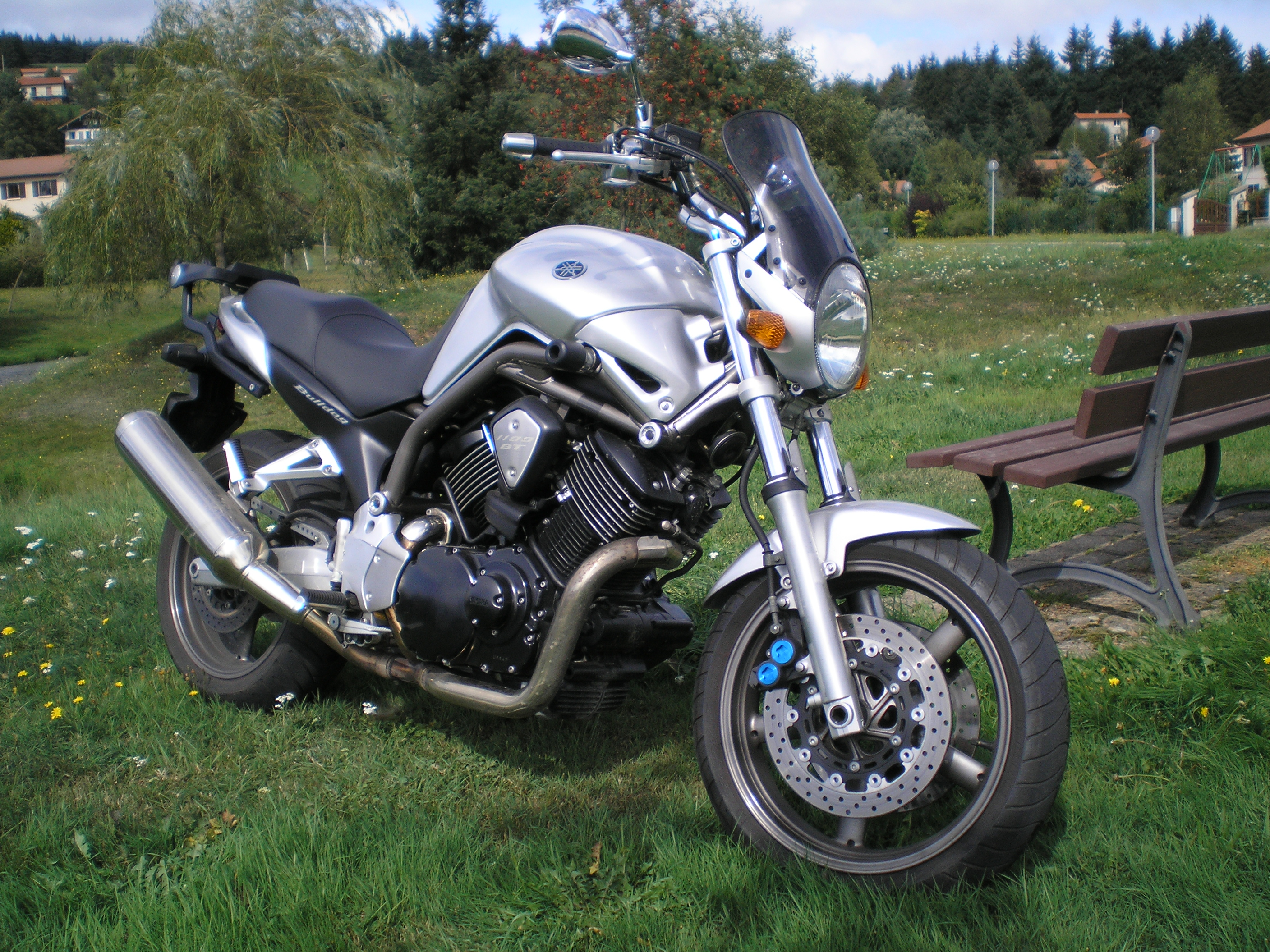 Yamaha BT 1100 Bulldog Auteur : Dédélembrouille Catégorie:Image de motocyclette